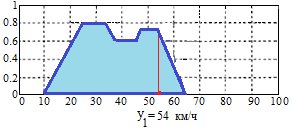 рис5